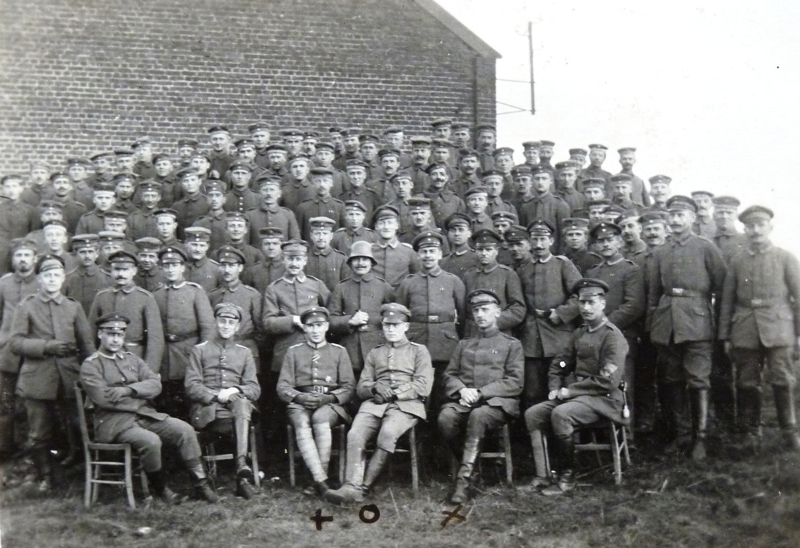 3.MGK RIR 6 / Lt.Strauss - Lt.Krummheuer - Off.Stv.Schmitt wohl unterstellt IR 403